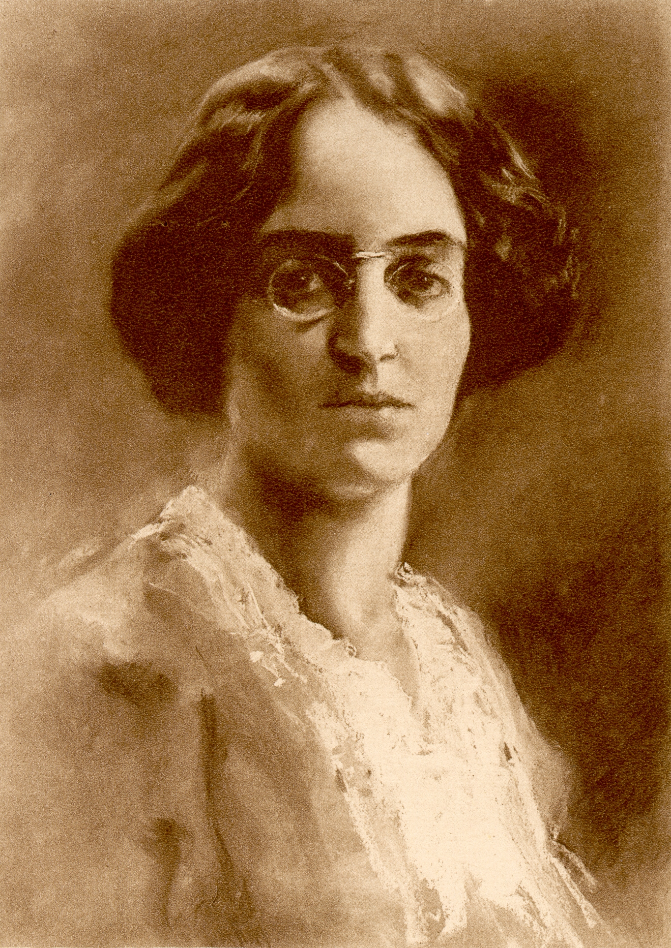 Zofka Kveder (1878-1926), Slovene writer.